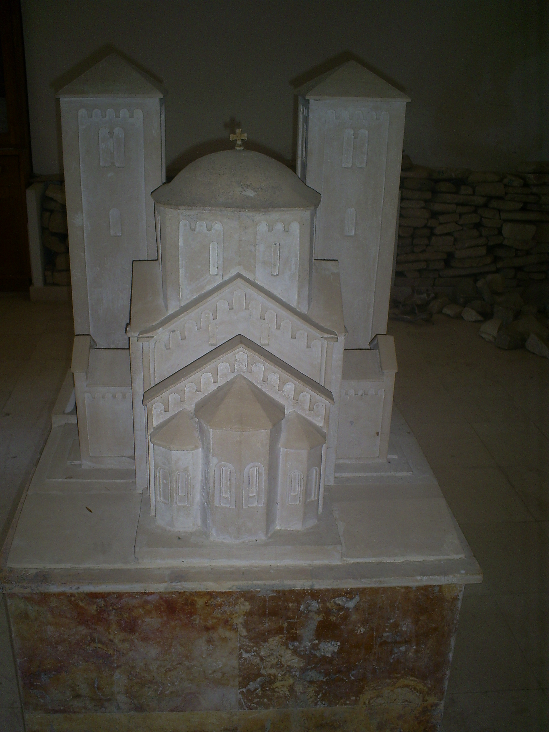 Muzej - manastir Djurdjevi stupovi, maketa